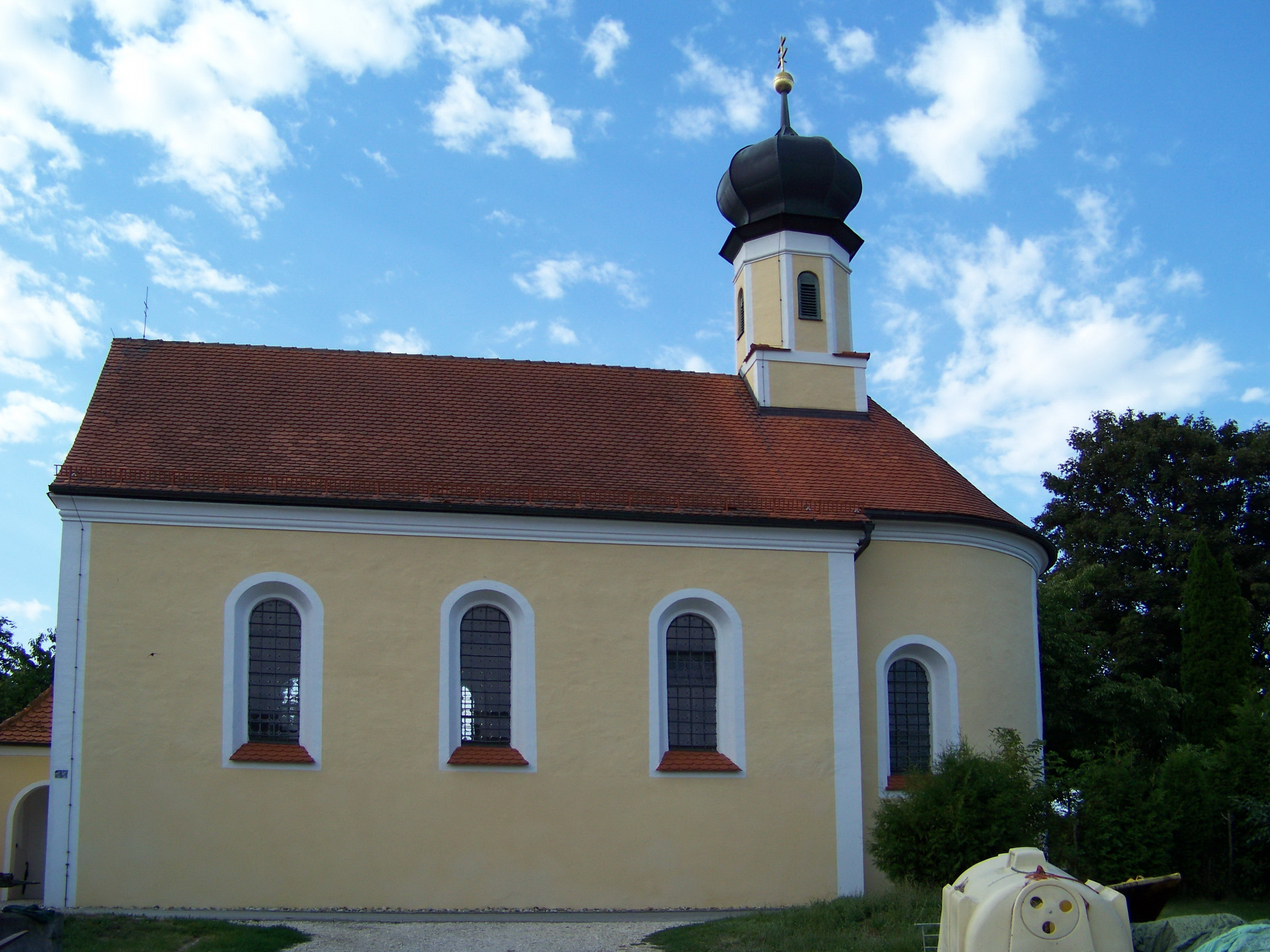 Thalmassing, Obersanding. Katholische Nebenkirche St. Petrus, Saalbau mit eingezogenem Chor und Chordachreiter mit Zwiebelhaube, 17. Jh; mit Ausstattung.